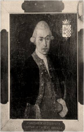 Retrato de Santiago de Aristeguieta y Aguirre, IV marqués de la Paz